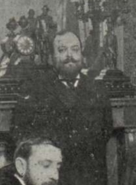 Los secretarios del Congreso